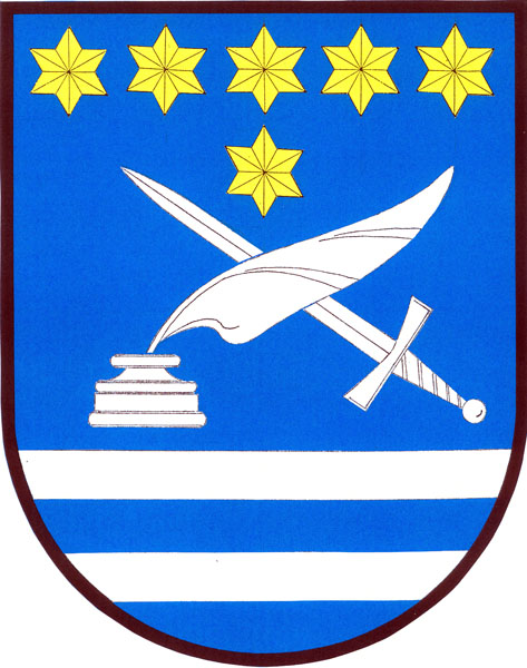 Znak obce Libuň